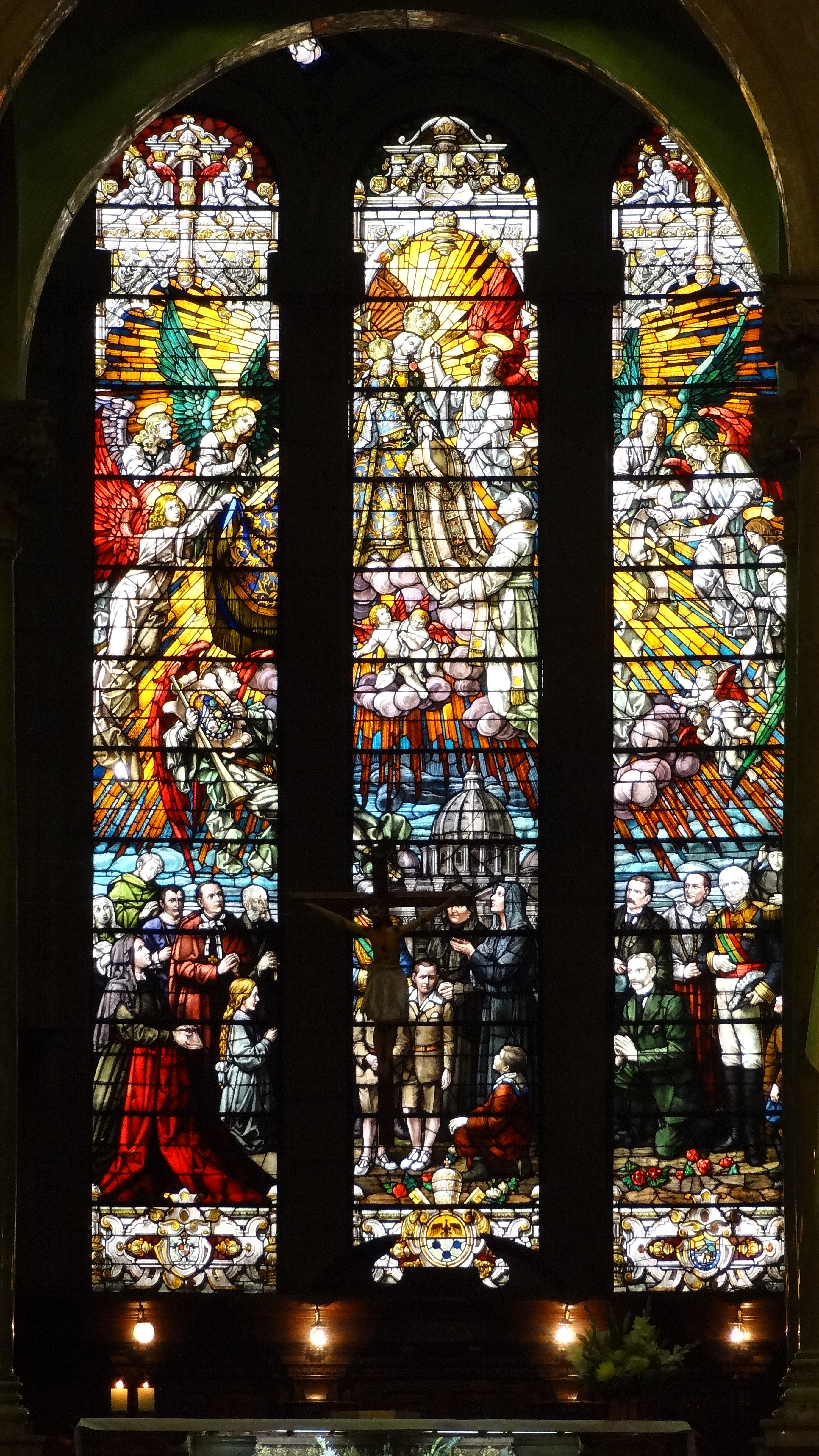 Detalle del Vitral del Altar Mayor de la Catedral de Nuestra Señora de La Paz